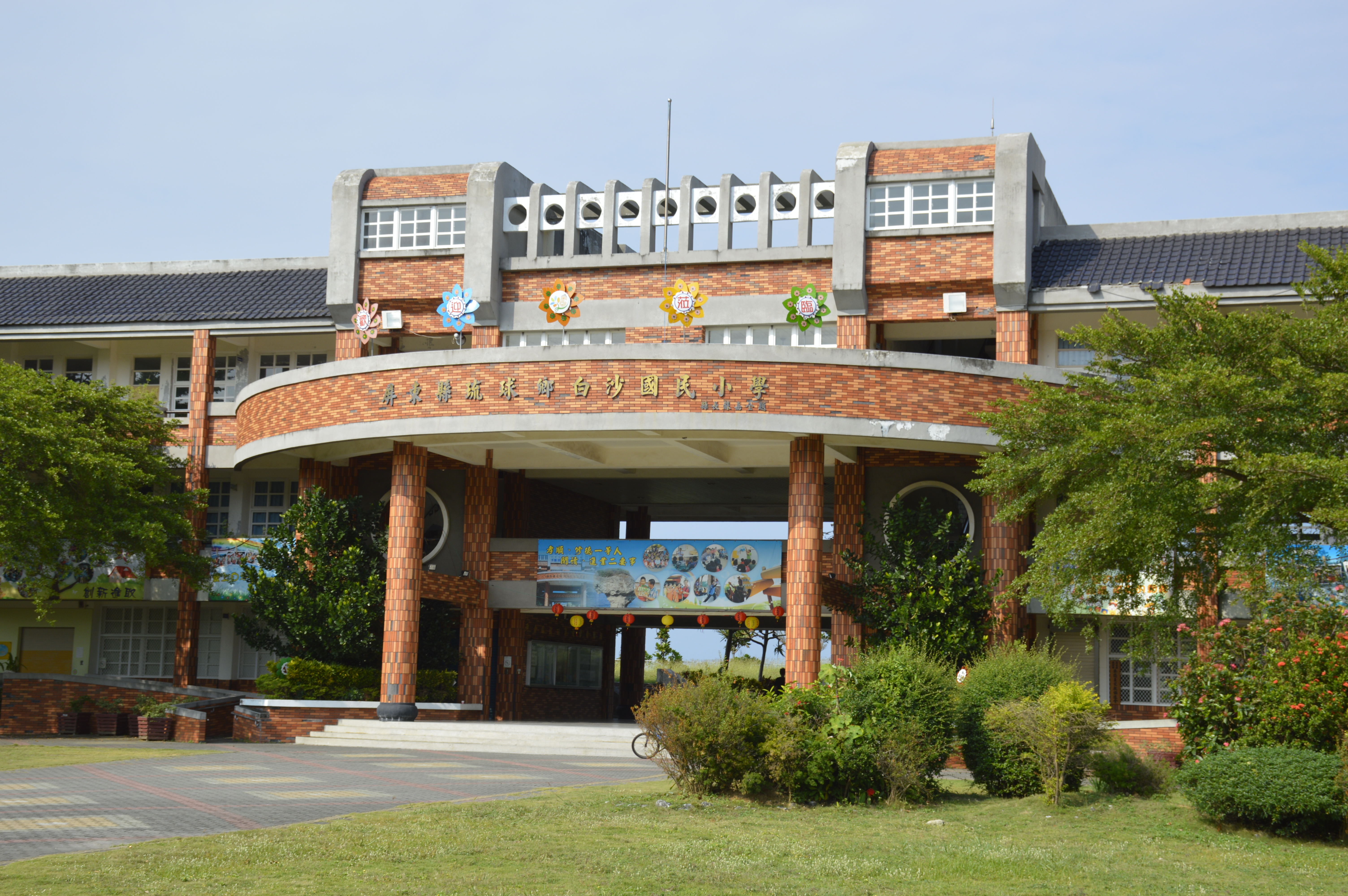 中文（台灣）: 屏東縣琉球鄉白沙國小